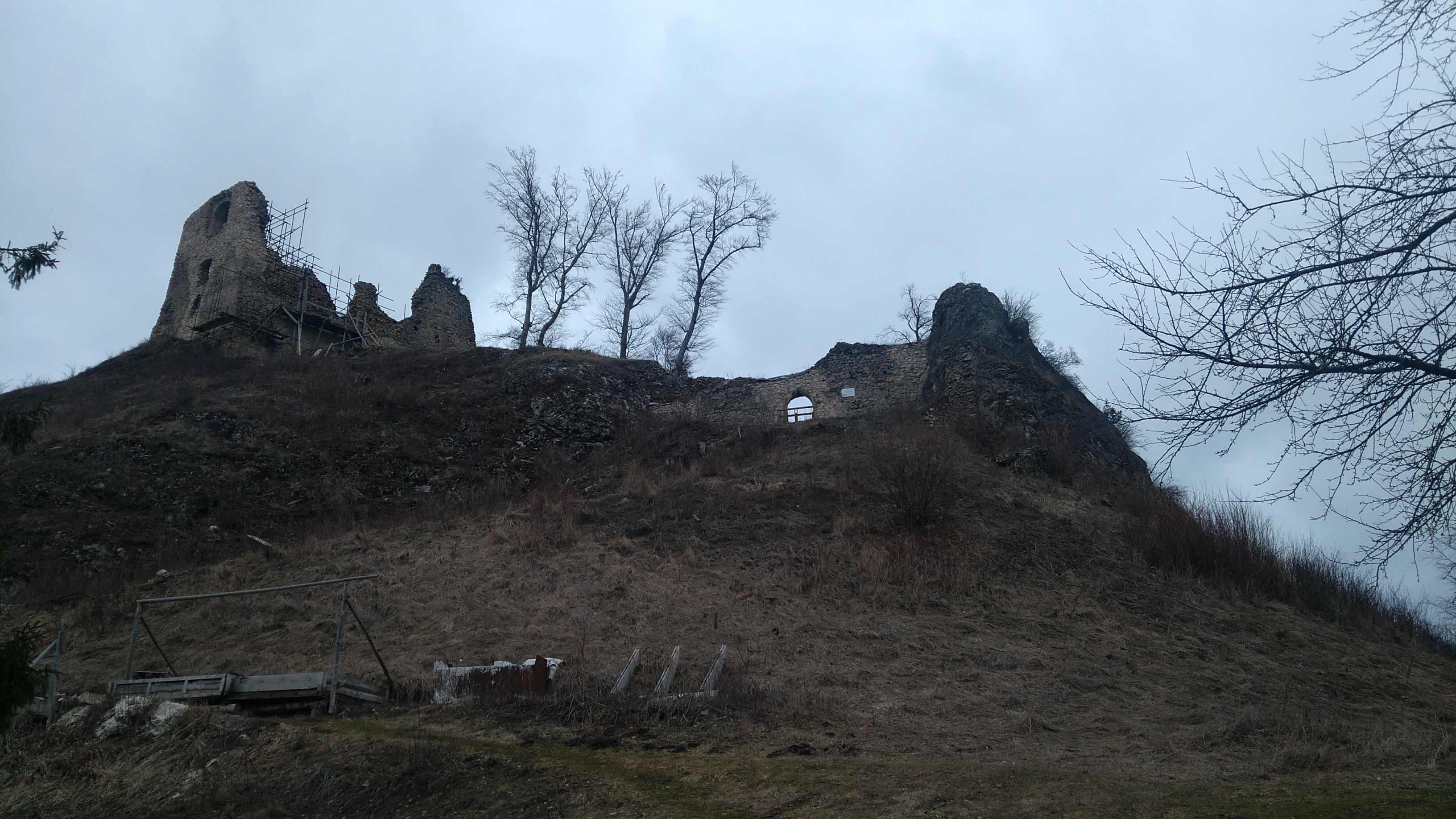 Hradné bralo